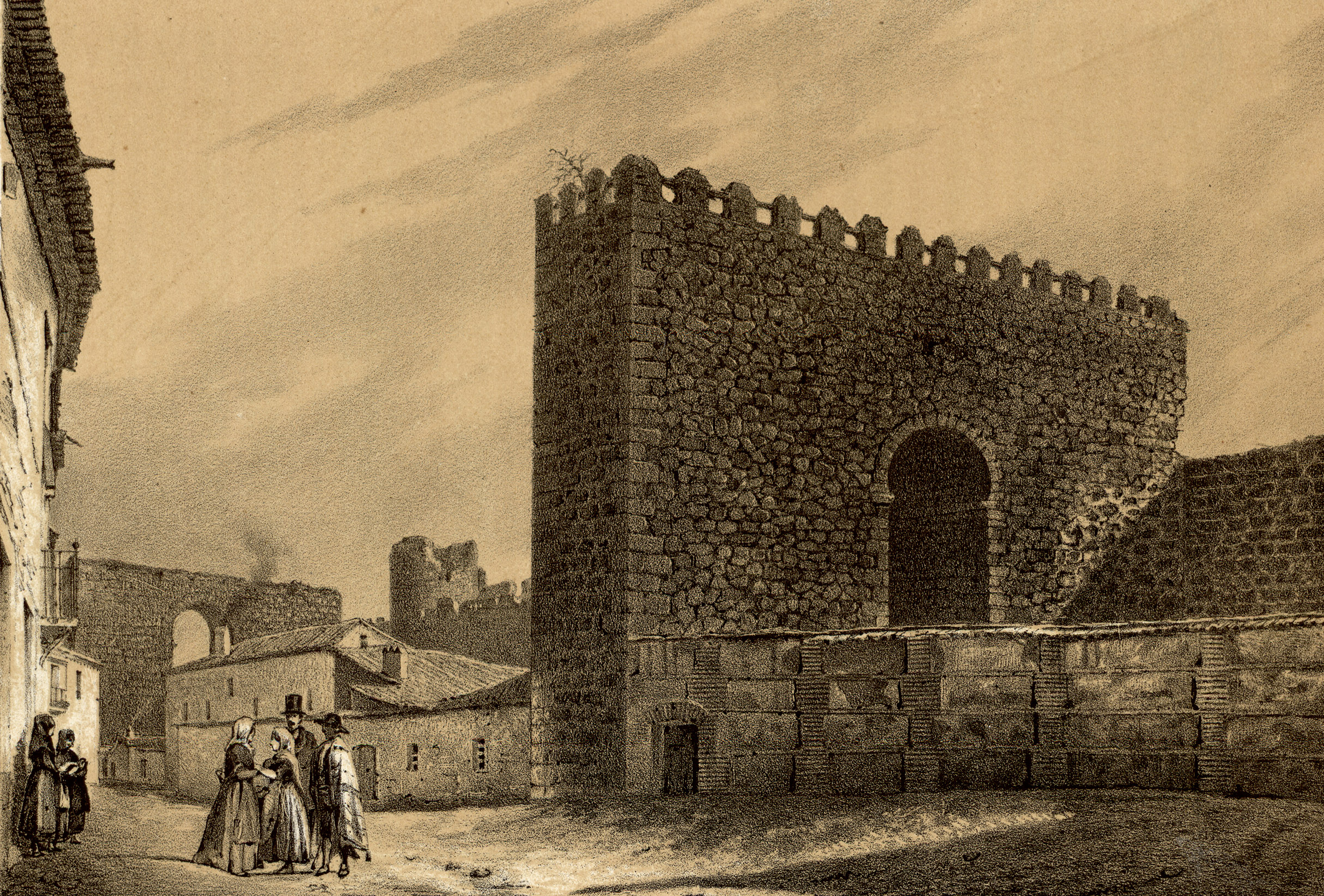 Talavera de la Reina (restos de la antigua fortificación).